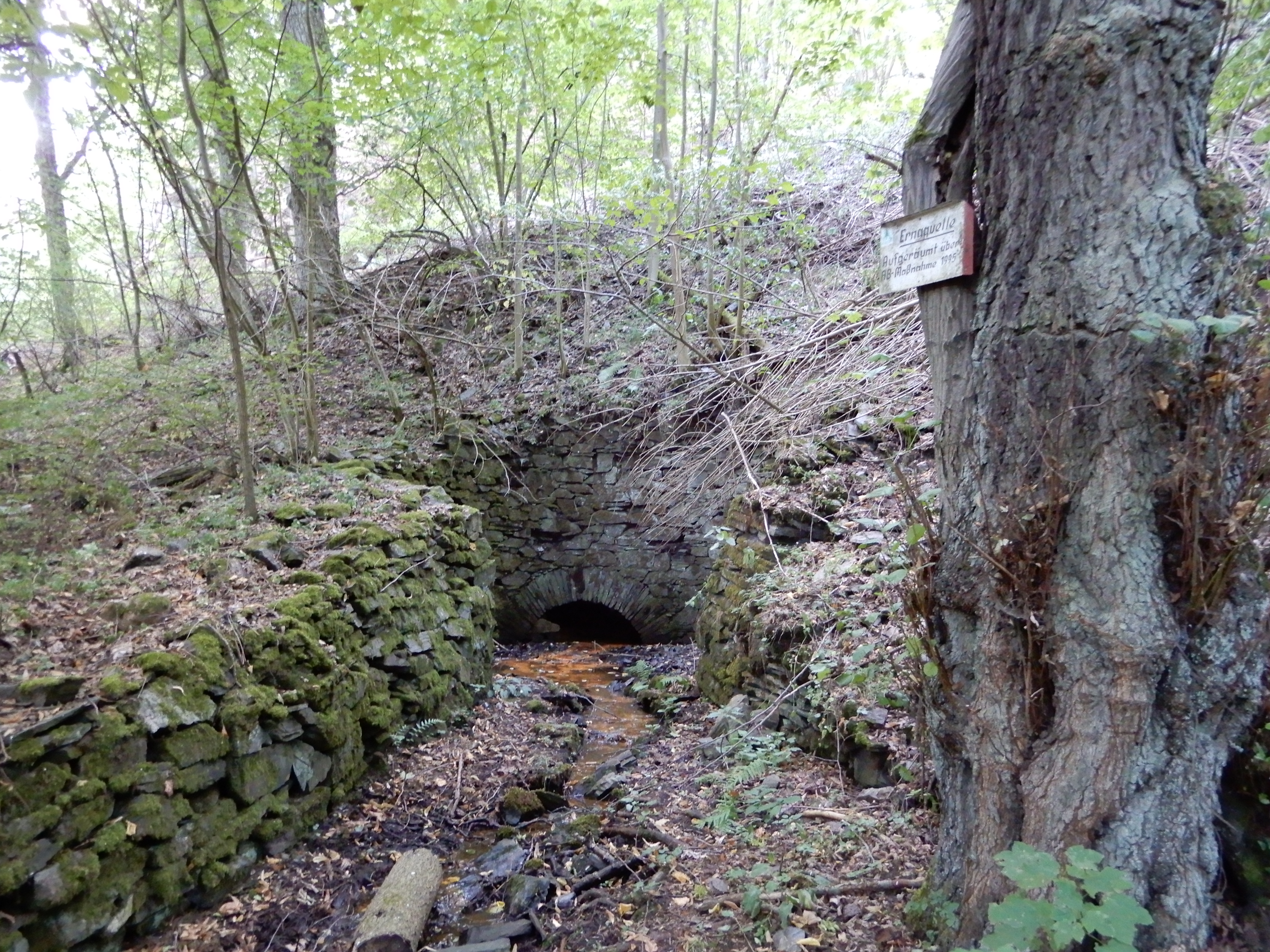 Ernaquelle am ehemaligen Helenenstollen